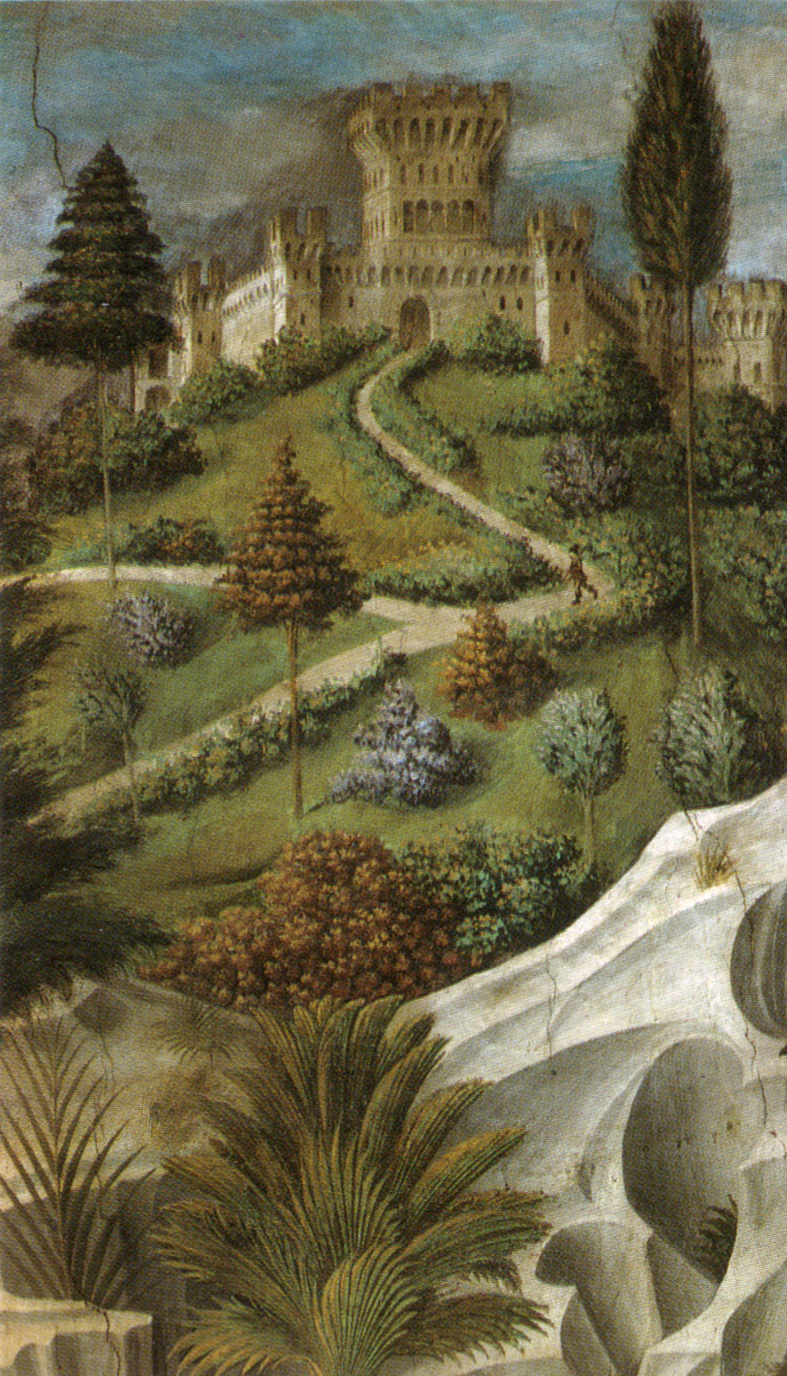 detail